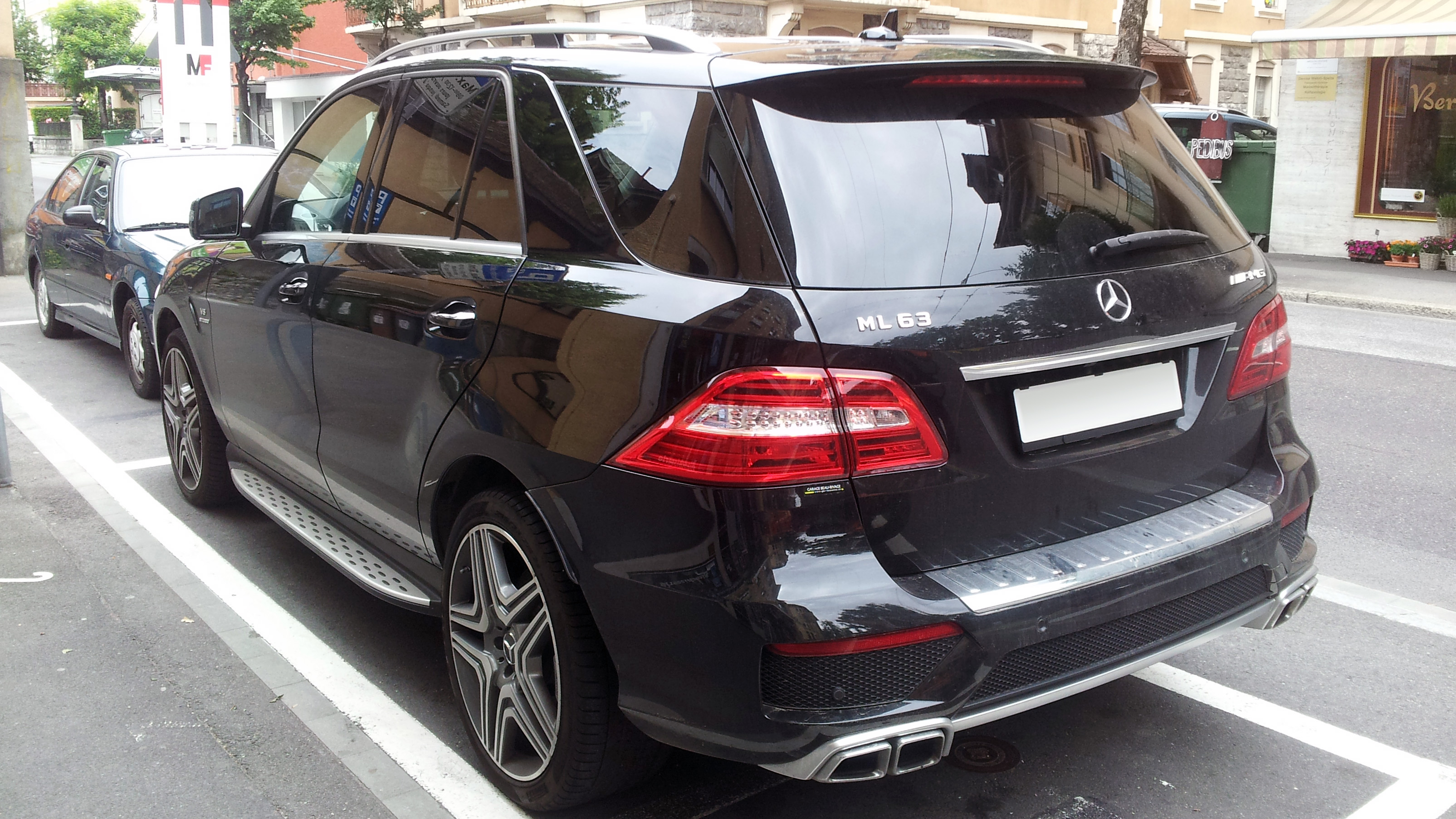 Mercedes-Benz ML 63 AMG (W166)